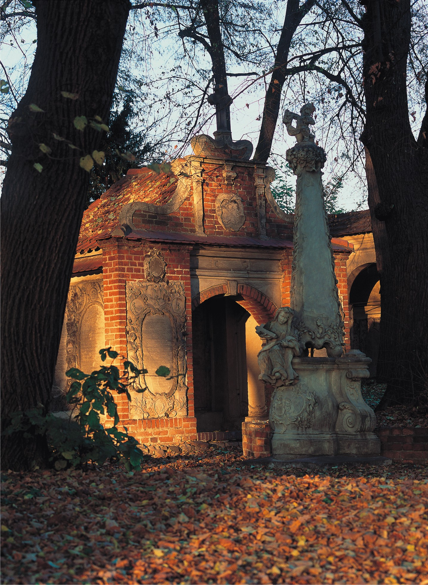 Staromiejski cmentarz ewangelicki 02.2008.